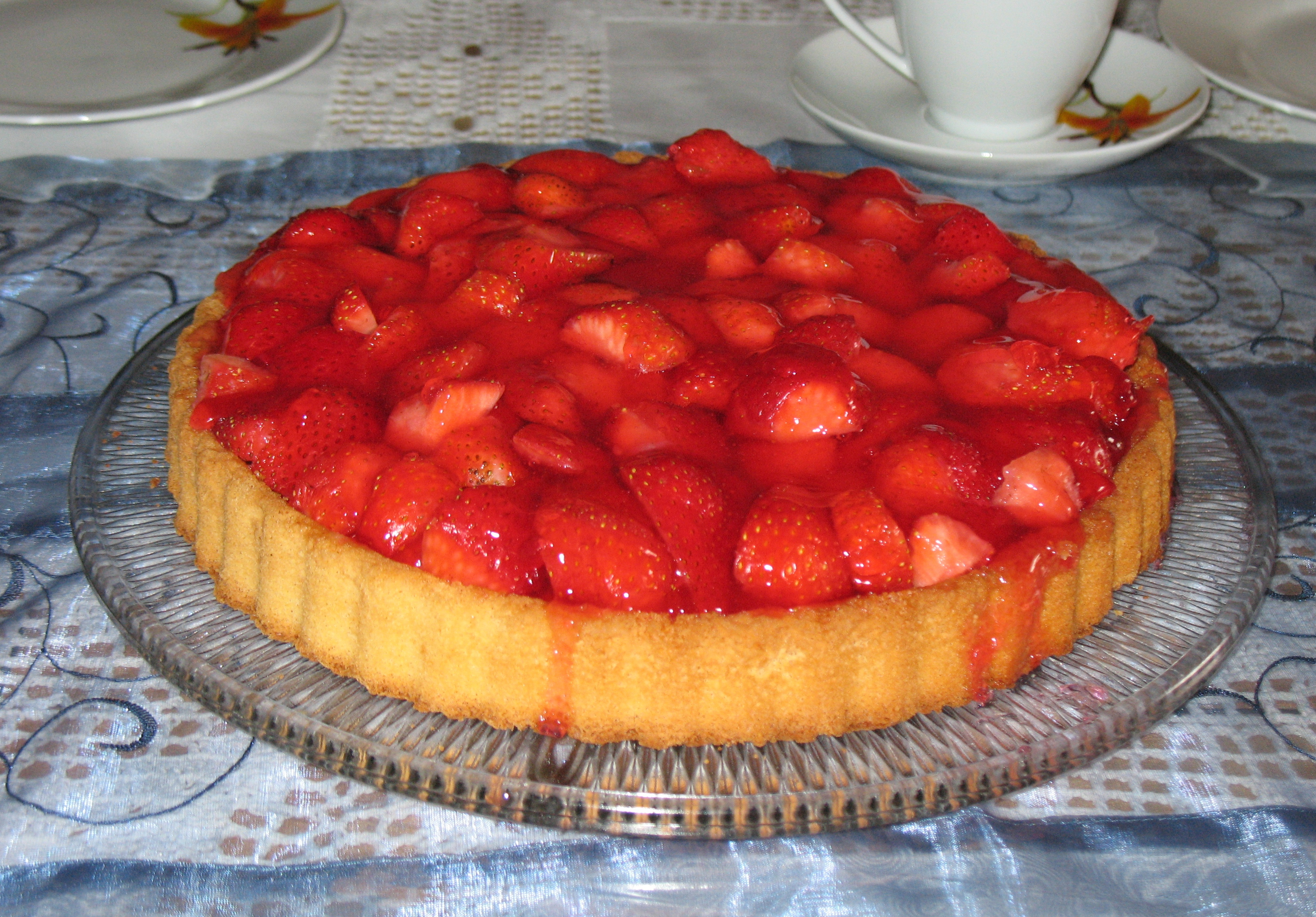 a Strawberry Pie (Erdbeerkuchen)